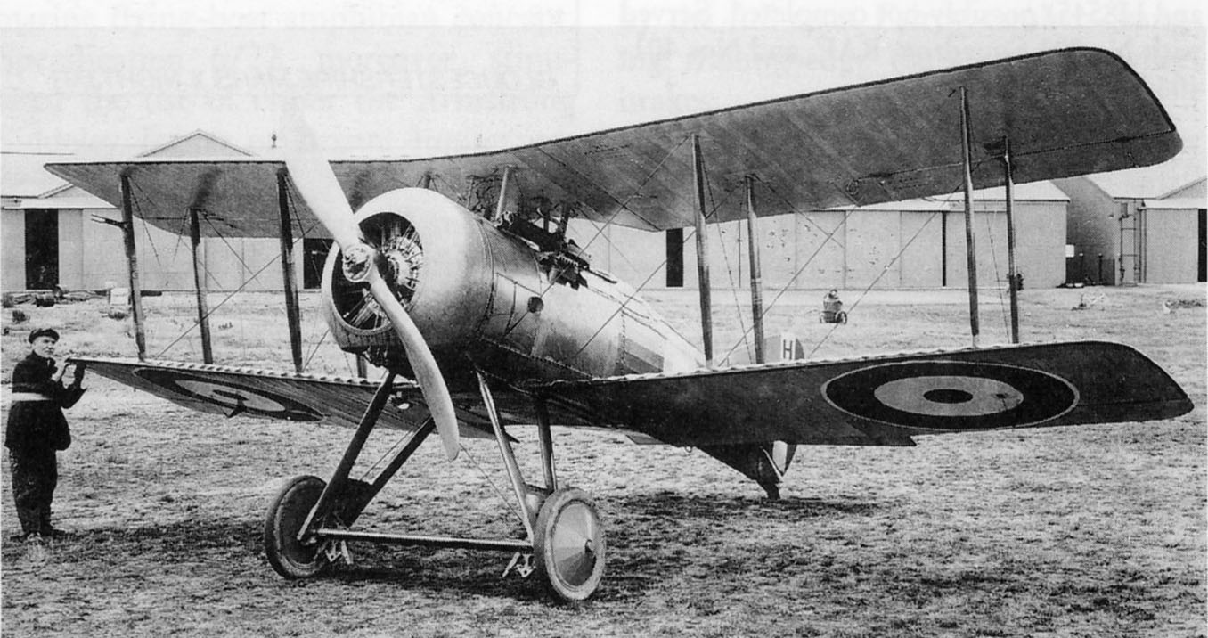 Gloster Nightjar H8539